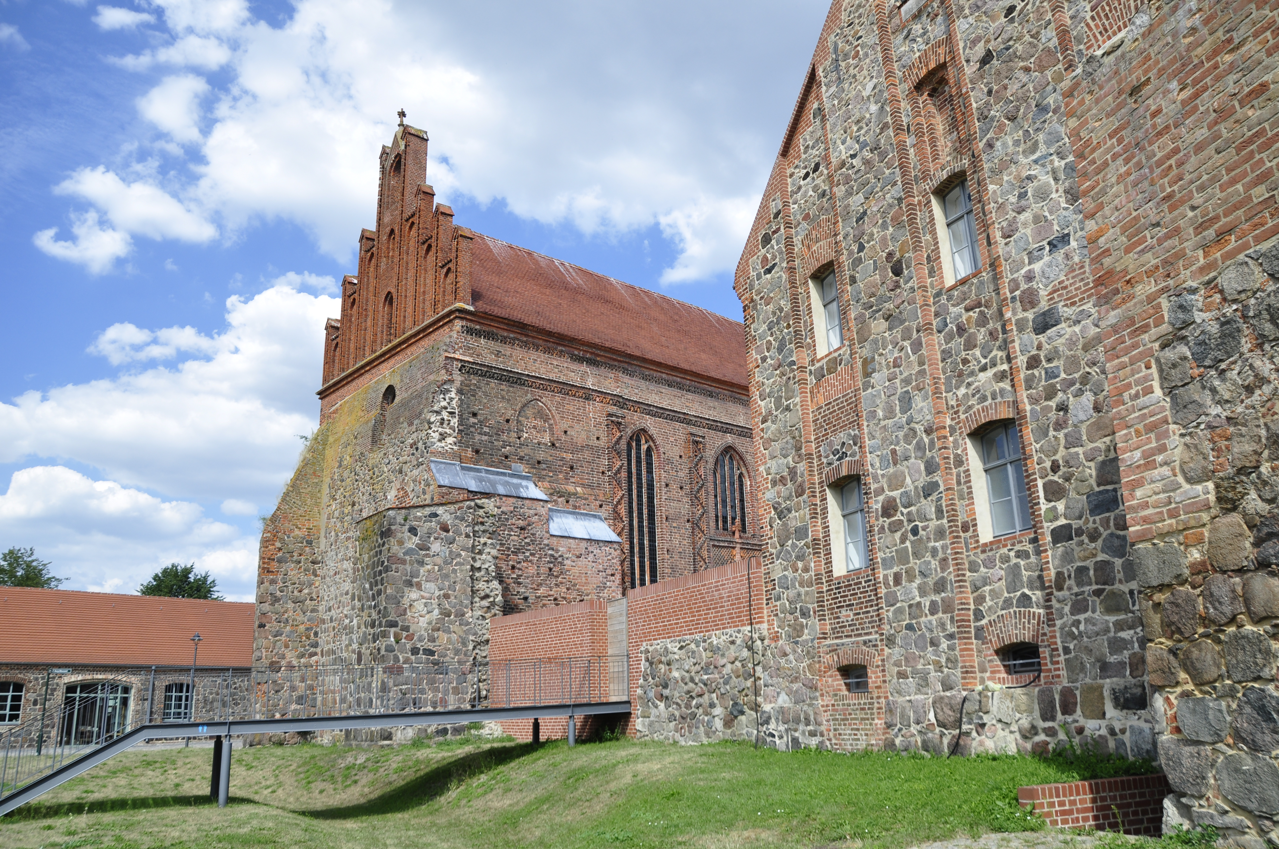 Burg Ziesar